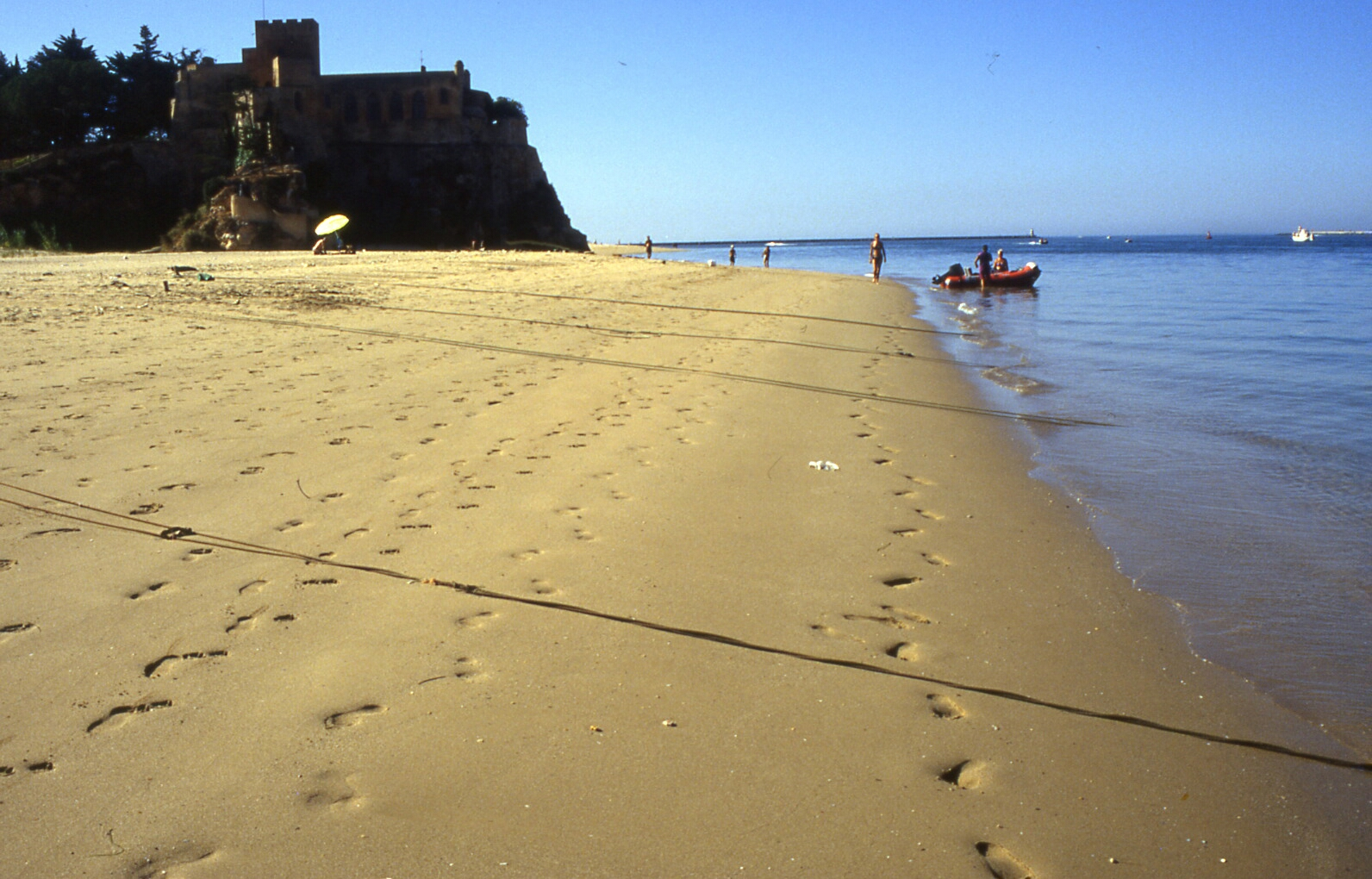 Ferragudo Strand 1